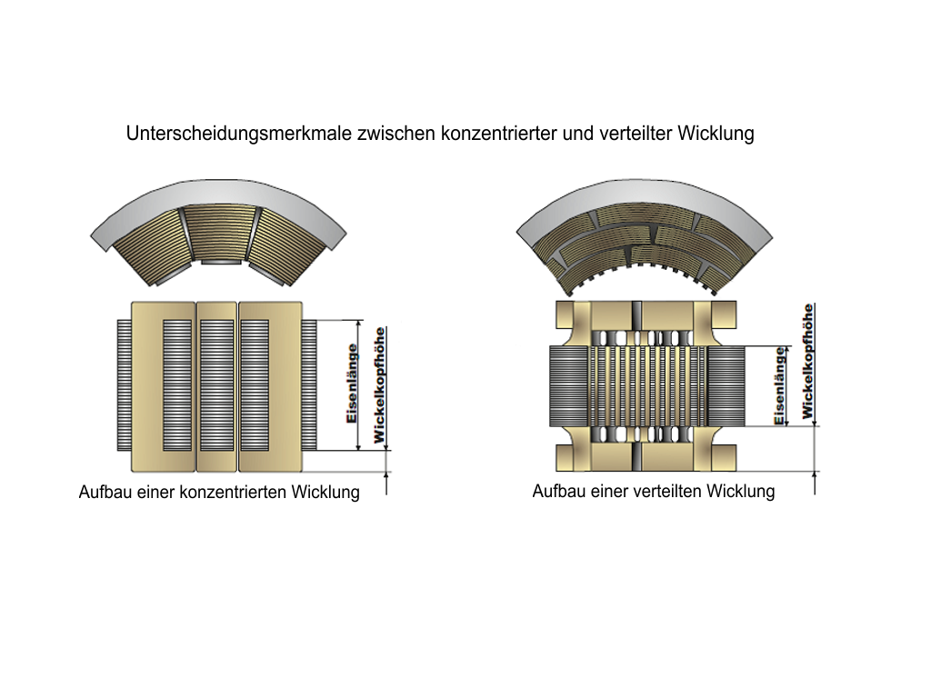 Unterscheidungsmerkmale zwischen konzentrierter und verteilter Wicklung